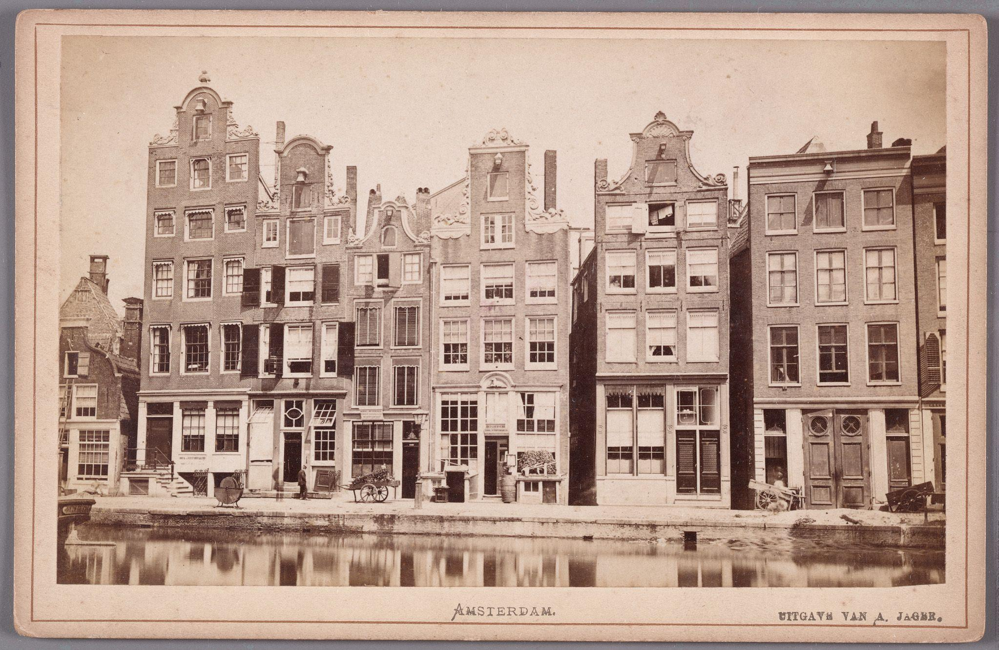 Beschrijving Nieuwezijds Voorburgwal 273-317 Gezicht op de Pijpenmarkt, met van links naar rechts de ingangen van de Zoutenhaansteeg, de Kerksteeg en de Witte Kelksteeg. De nummers 275-285 zijn inpandig. Documenttype foto Vervaardiger Jager, A. (uitgever) Gebroeders Douwes (uitgever) Collectie Collectie Stadsarchief Amsterdam: kabinetfoto's Datering 1867 t/m 1875 Geografische naam Nieuwezijds Voorburgwal Inventarissen Afbeeldingsbestand 010005001296 Generated with Dememorixer